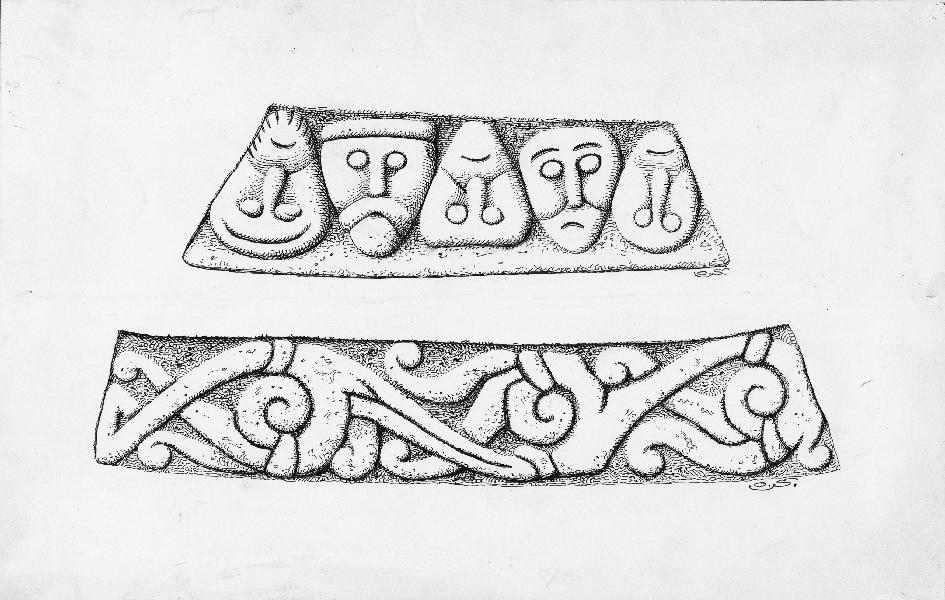 Dopfunt, romansk, detalj, ornament. Teckning av Olof Sörling. Kategori: (04) Dopfuntar Dopfunt, romansk, detalj, ornament. Teckning av Olof Sörling.